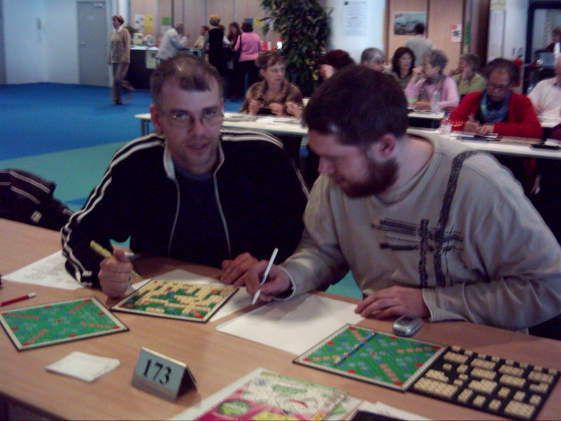 Prise par moi, a Cannes